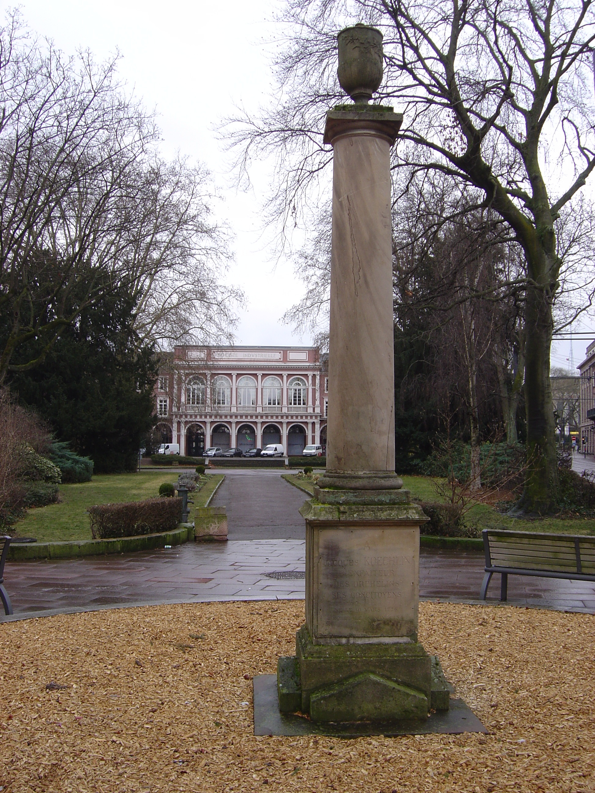 Colonne commémorative de 1835 élevée à la mémoire de Jean-Jacques Koechlin (1776-1834). Square de la Bourse, Mulhouse.